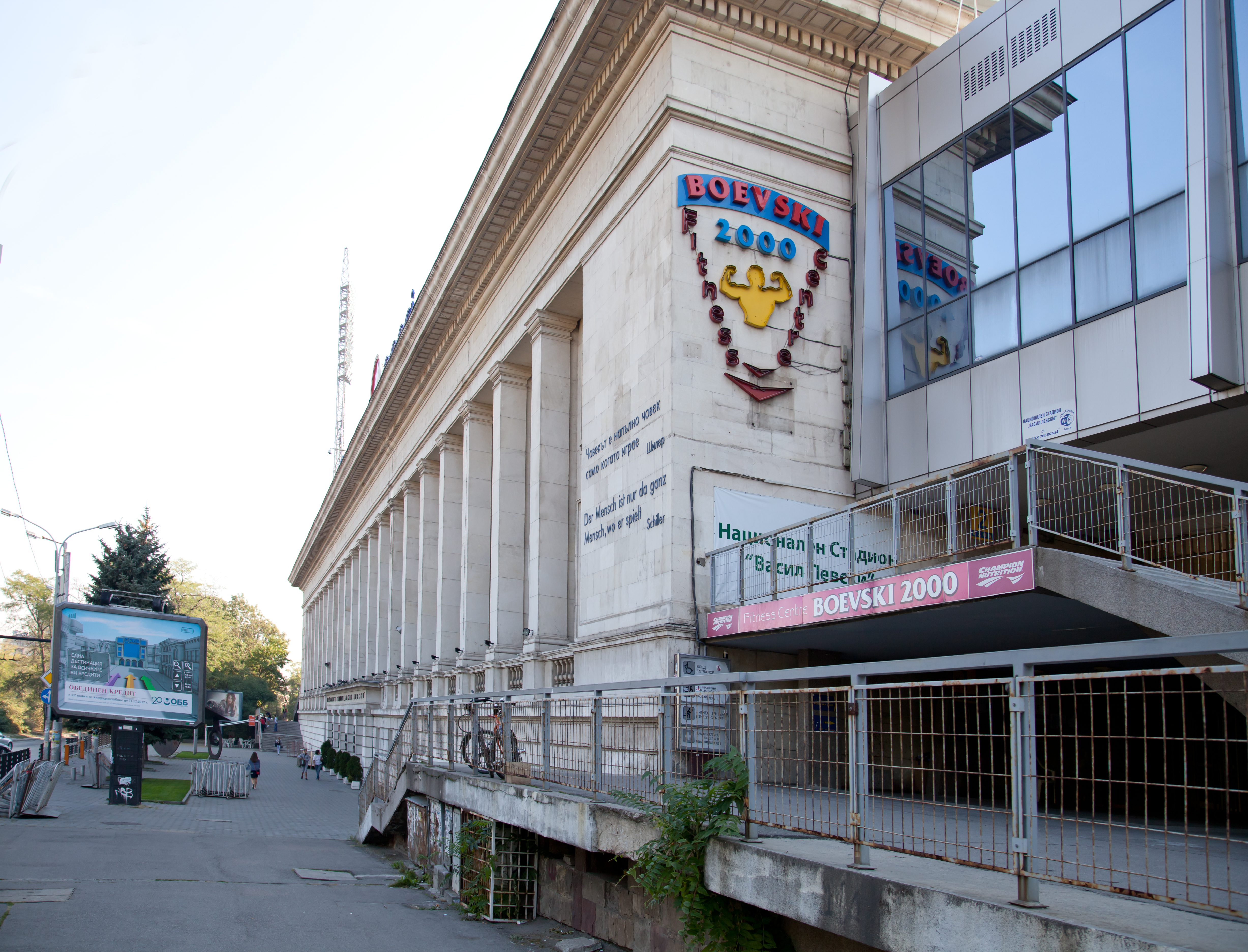 Wassil-Lewski-Nationalstadion; Sofia, Bulgarien